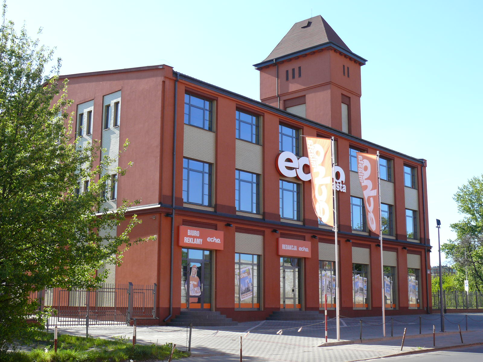 Fabryka ul. Wólczańska 241a w Łodzi